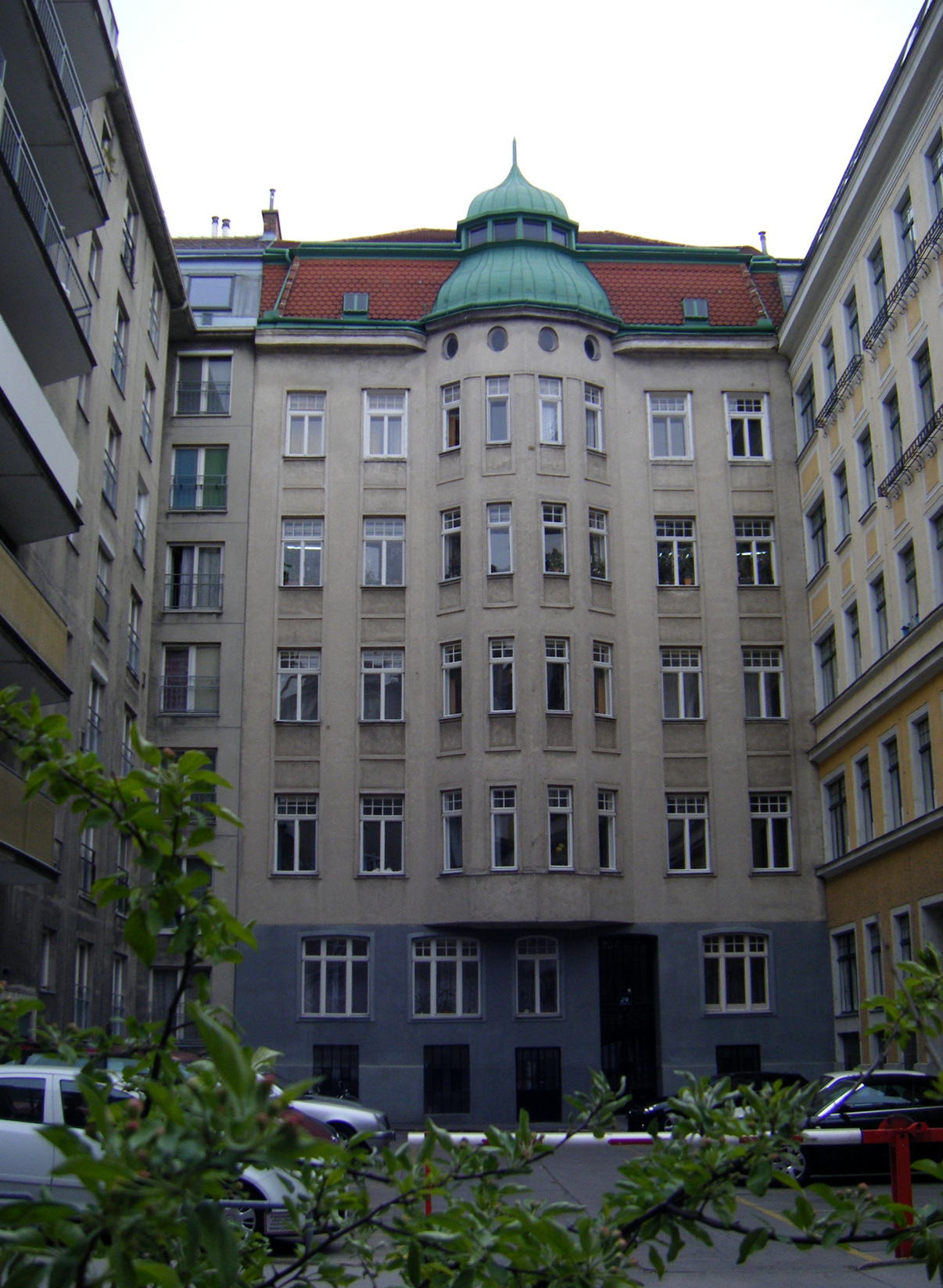 Rainergasse 29, 1040 Wien, Elternhaus von Bruno Kreisky, wo er am 30. Jänner 1935 verhaftet wurde.